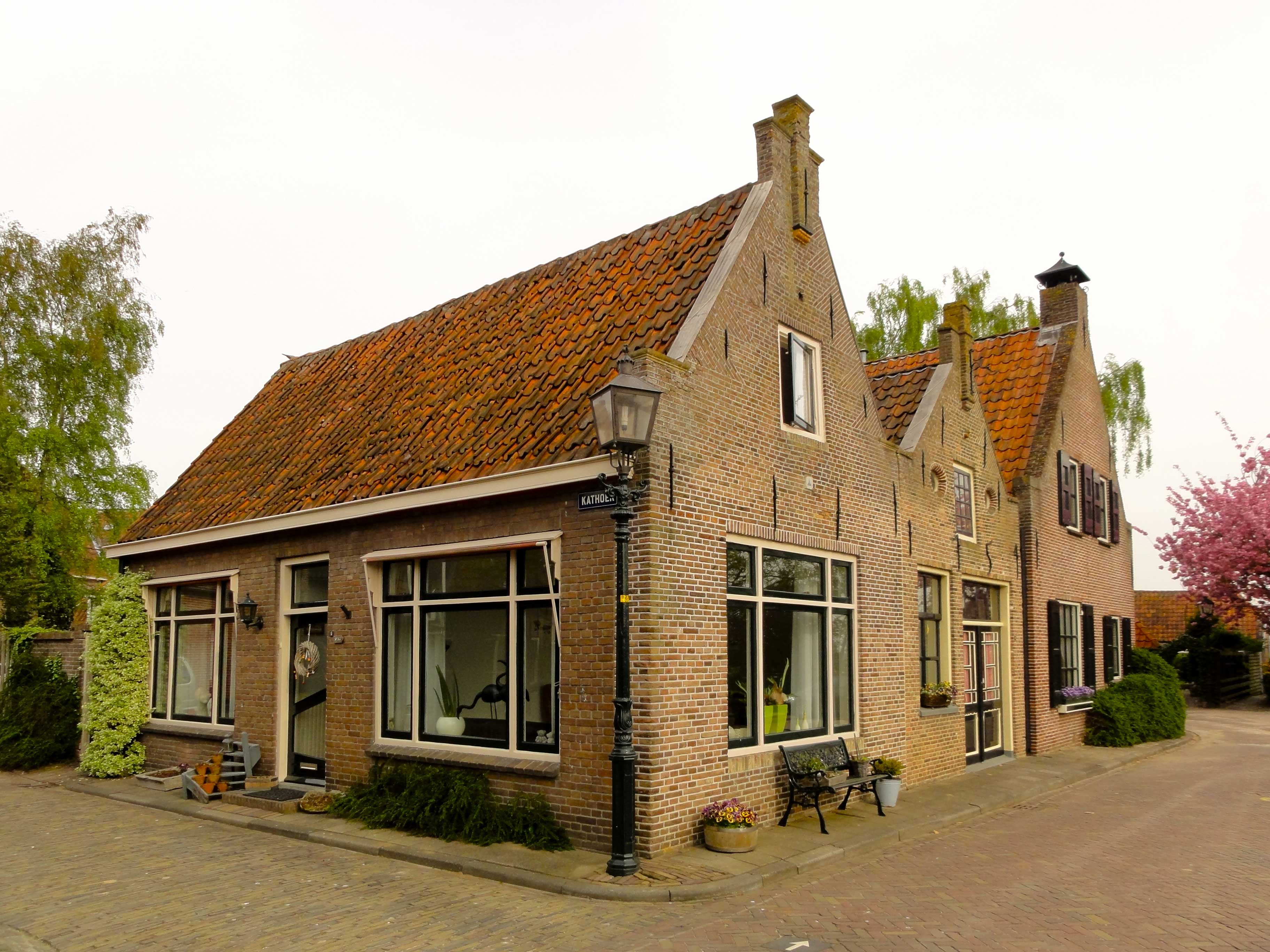 Kathoek 5 (rijksmonument)